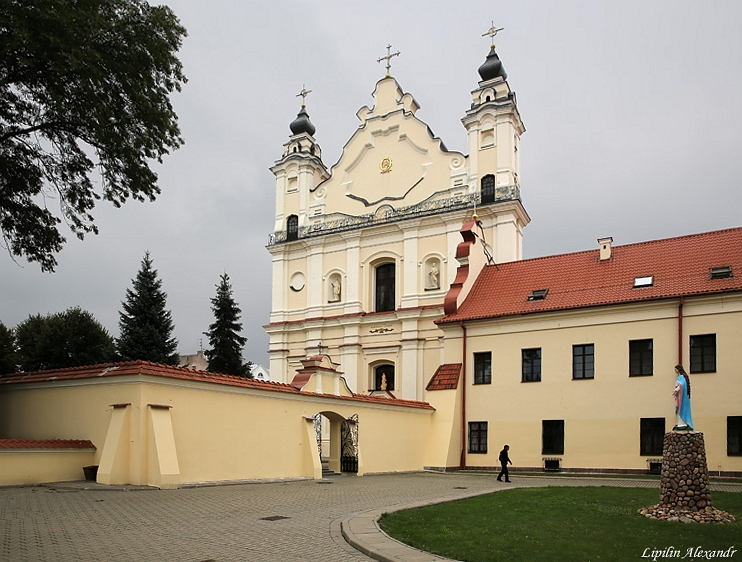 Пінск. Кляштар францысканцаў: Касцёл Узнясення Дзевы Марыі.